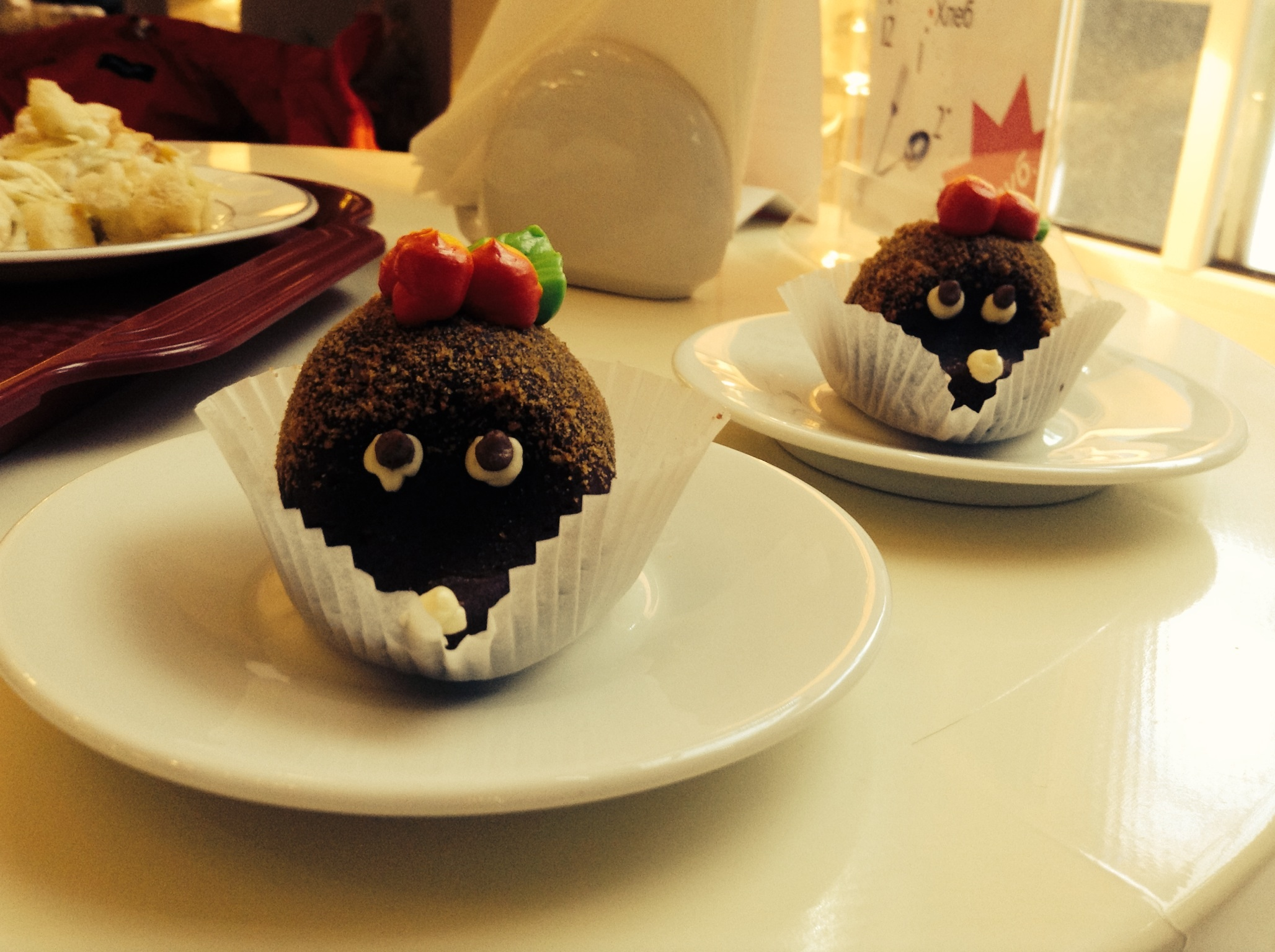 Пирожное картошка украшенное как ёжик.